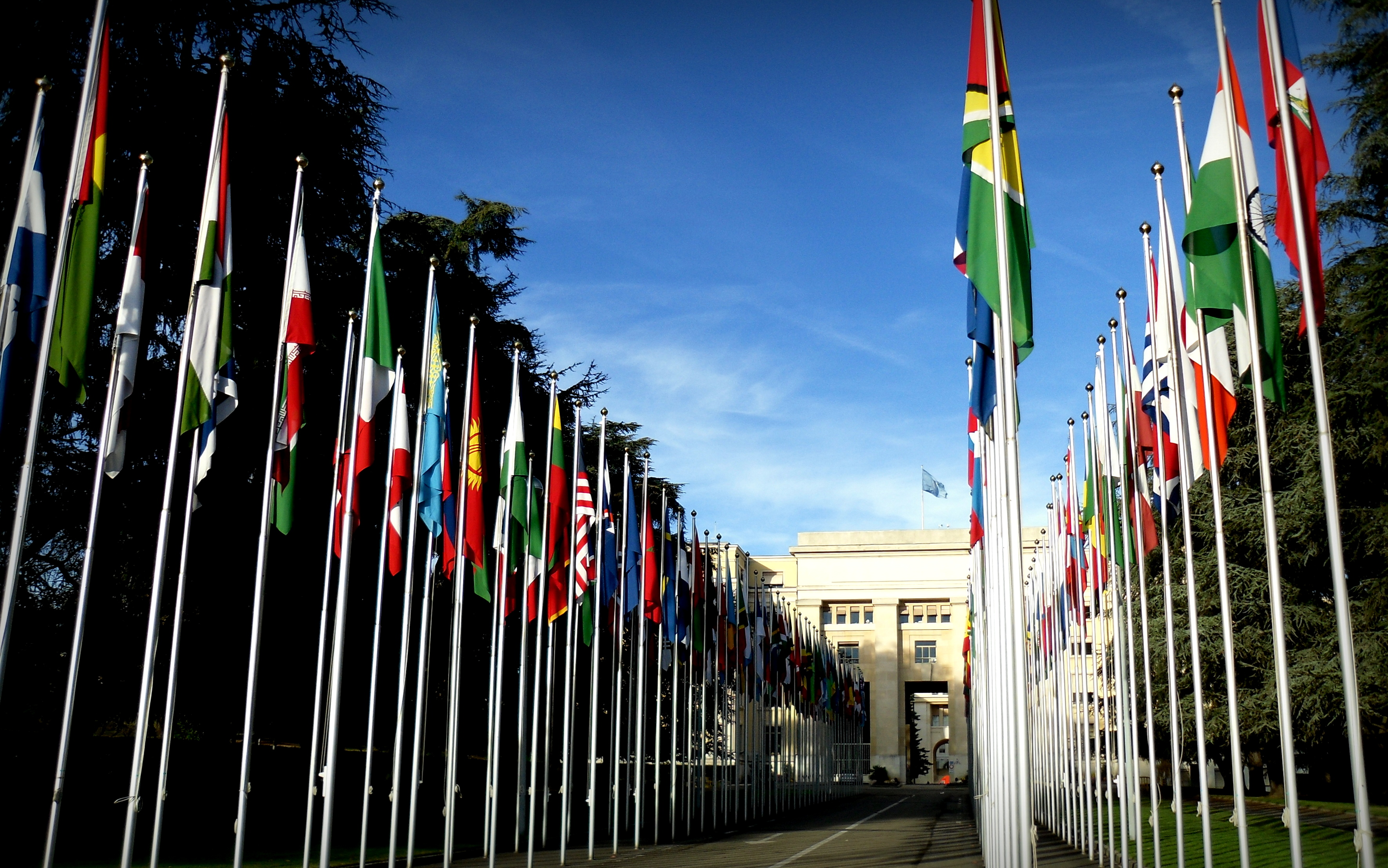 El Palacio de Naciones Unidas, en Ginebra.